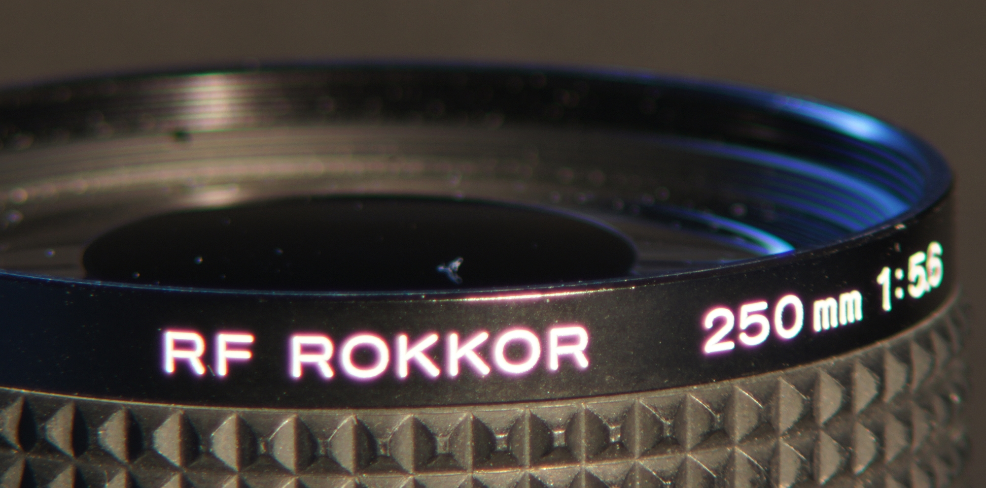 Farblängs- und Farbquerfehler. Nahaufnahme mit Minolta MC Tele Rokkor f/4 200mm und MD 2x Telekonverter 300-S, Novoflex BALMIN, Sony NEX-5. Offenblende f/4, effektiv f/8, Scharfgestellt auf "mm".